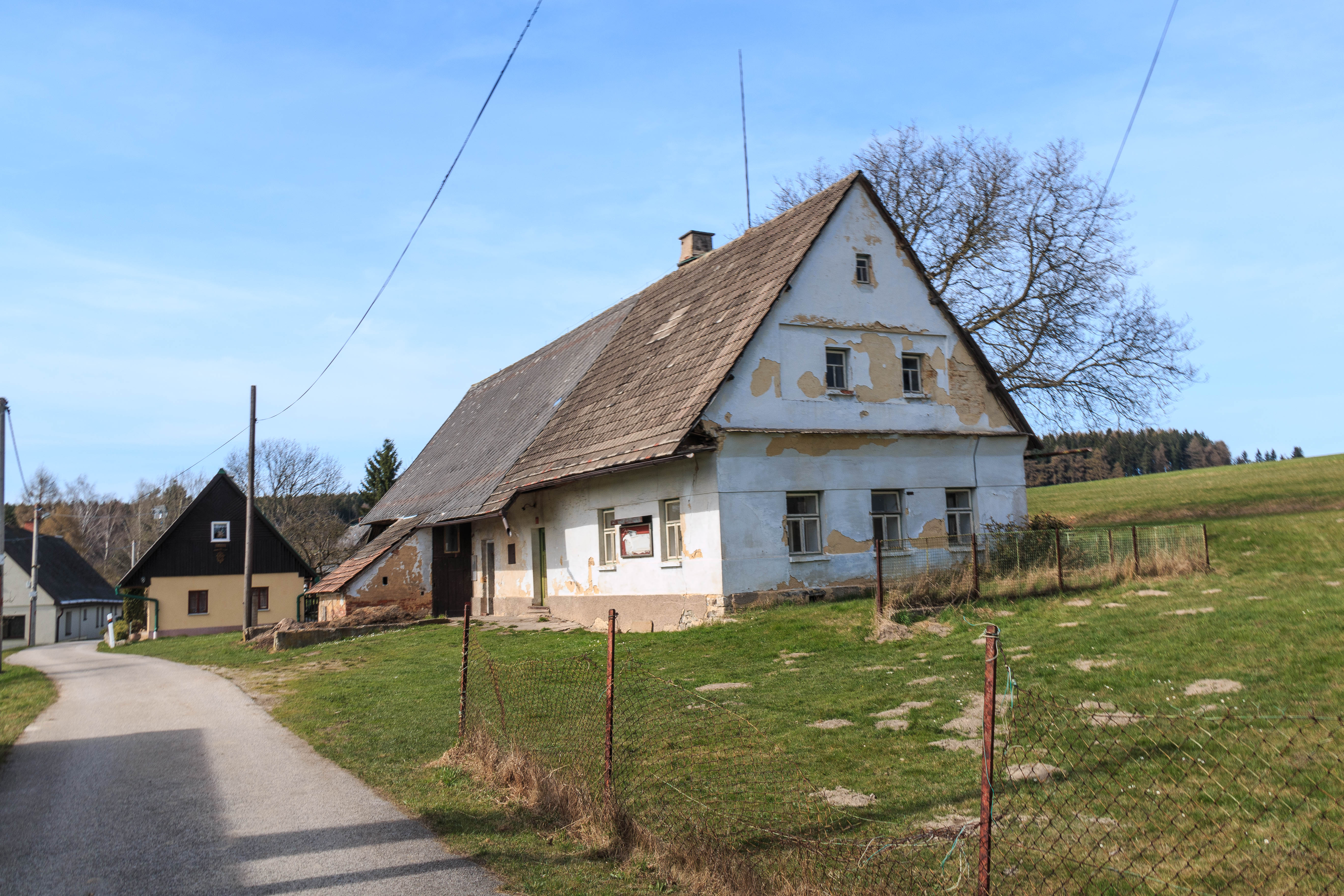 Posadov čp. 7